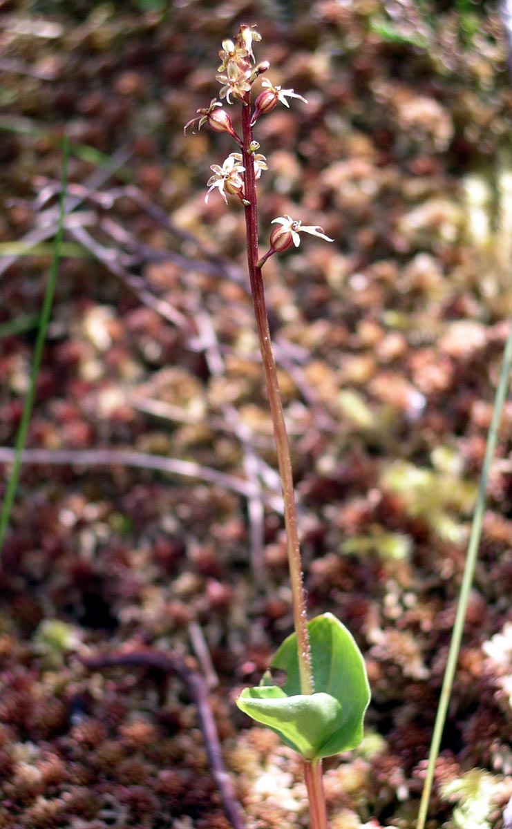 Listera cordata in Snowdonia